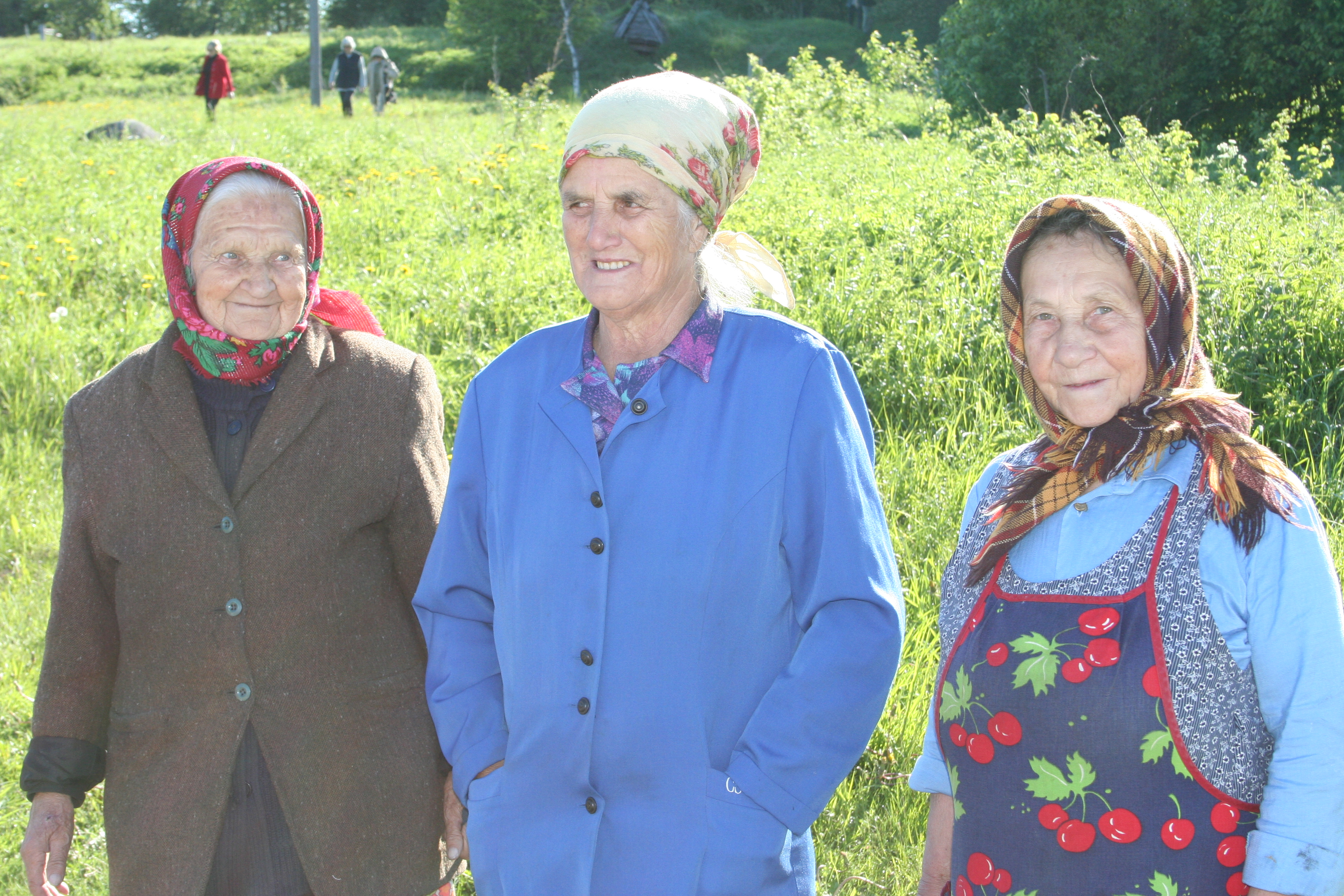 Karelian women in Sammatus